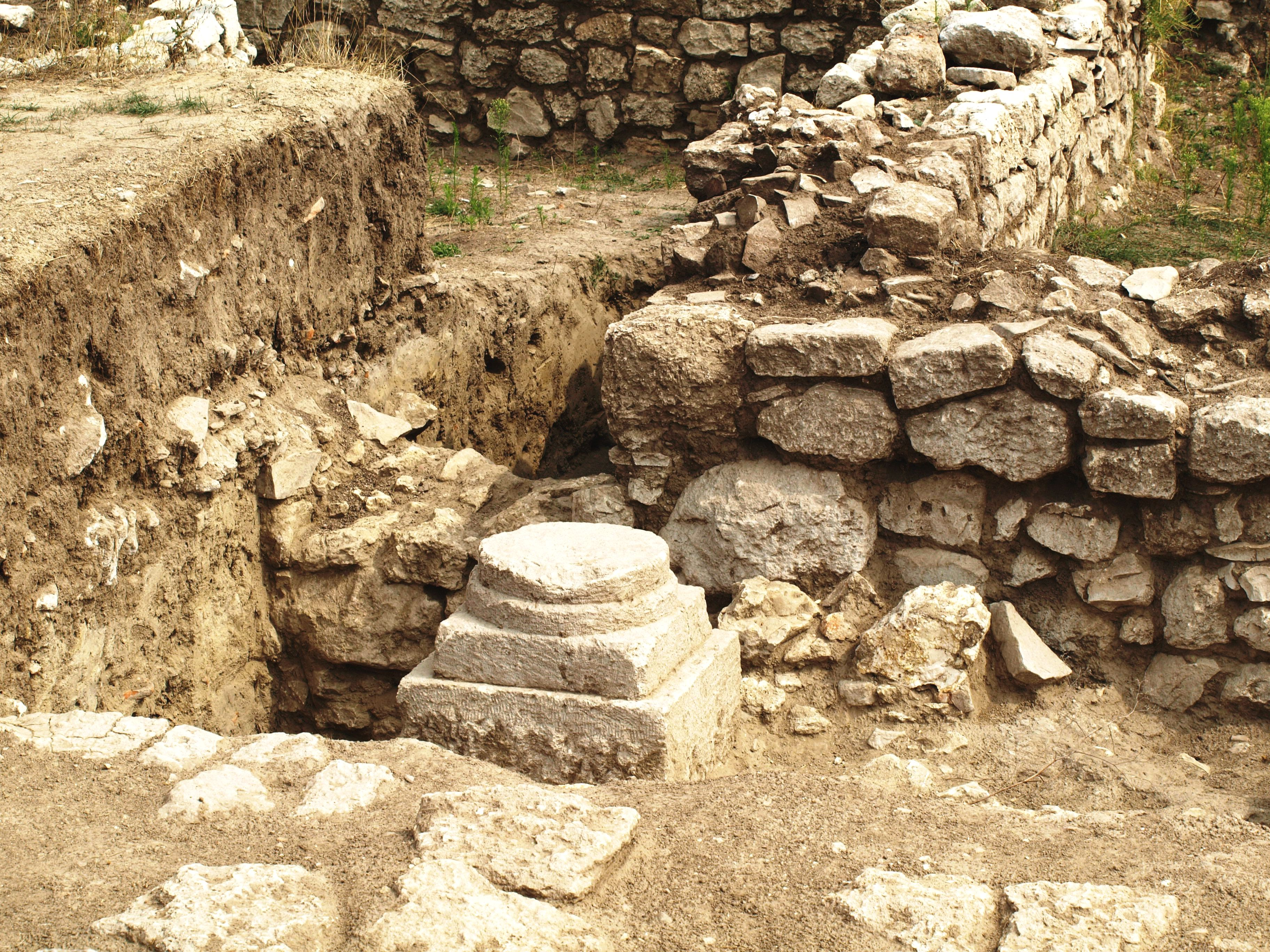 Altarul roman de la Adamclisi 06